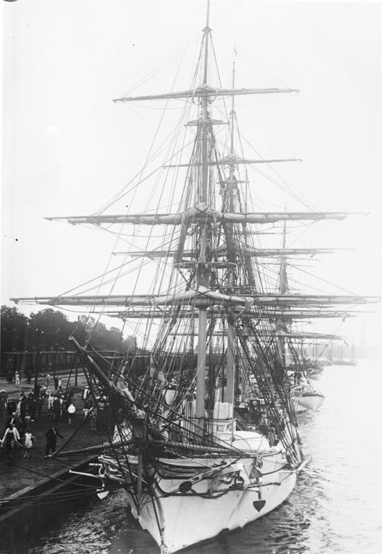 Schwedische Schulschiffe besuchen Deutschland! Das schwedische Schulschiff "Najaden" mit seiner wundervollen Takelage im Swinemünder Hafen zu einem Besuch in Deutschland.